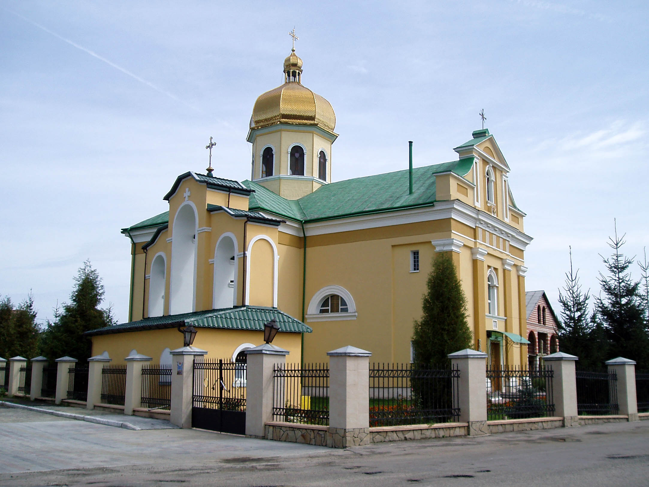 Церква в Розвадові. Збудована в середині XIX ст.